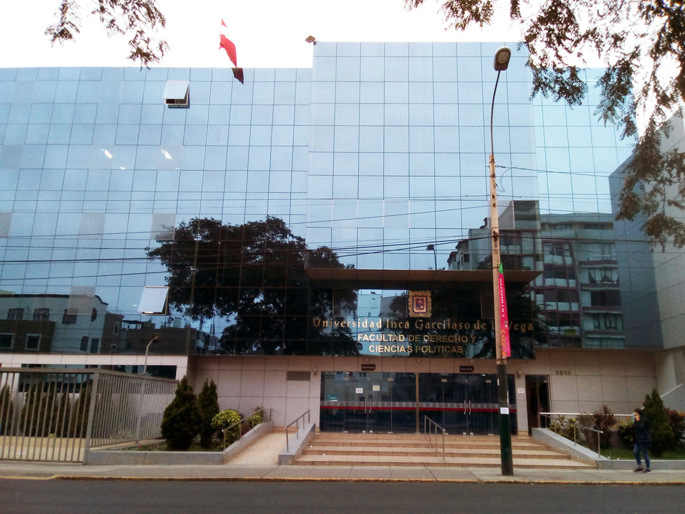 Fachada de la Facultad de Derecho y Ciencias Políticas de la UIGV